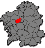 Mapa coa localización da Comarca de Arzúa.